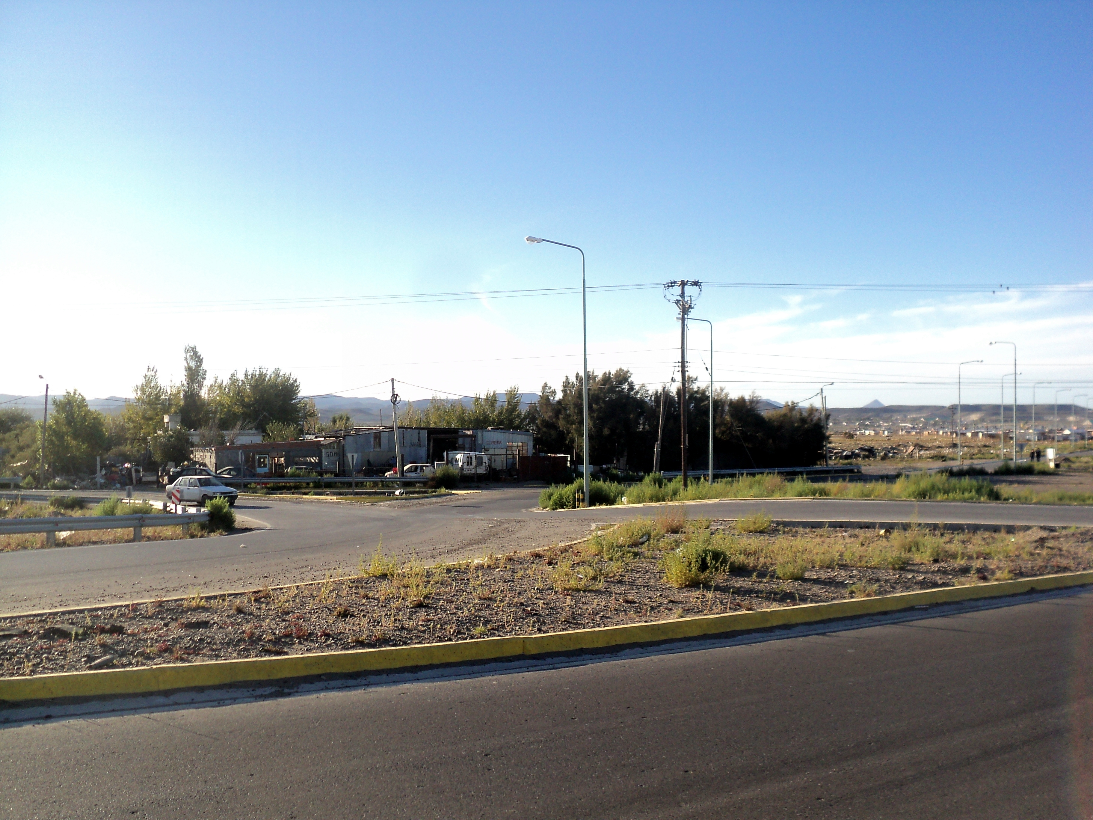 Donde ayer estuvo el empalme hoy está urbanizado, pero aun es un sitio de comunicaciones terrestre atravesado por la ruta 39 y un camino alternativo